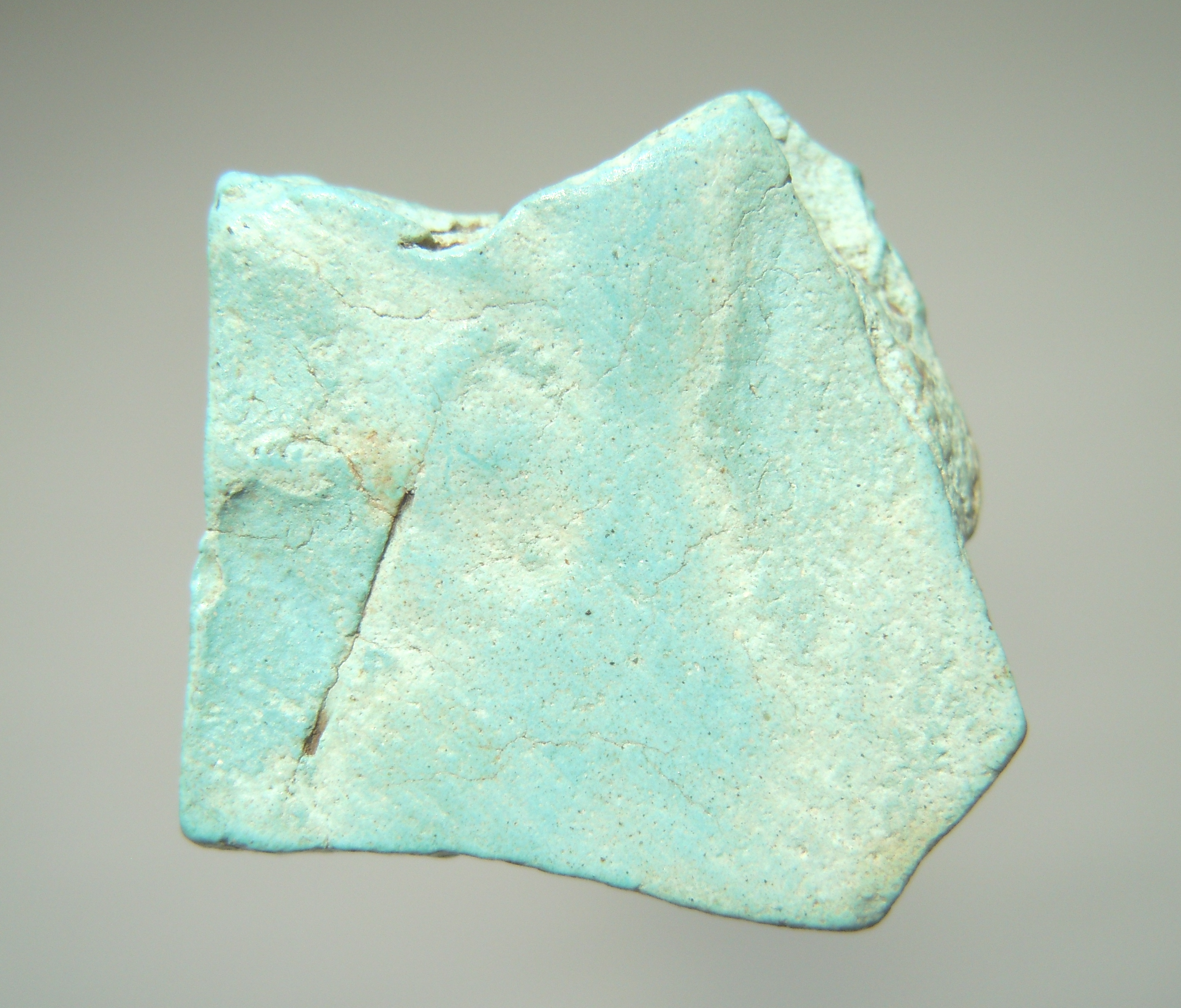 Находка в районе Псекупского поселения майкопской культуры. Адыгея.